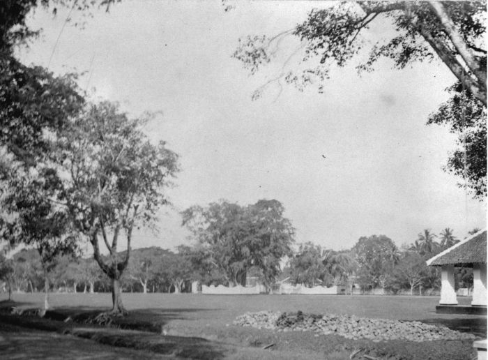 Foto. Aloen-Aloen te Karanganjar, Java.